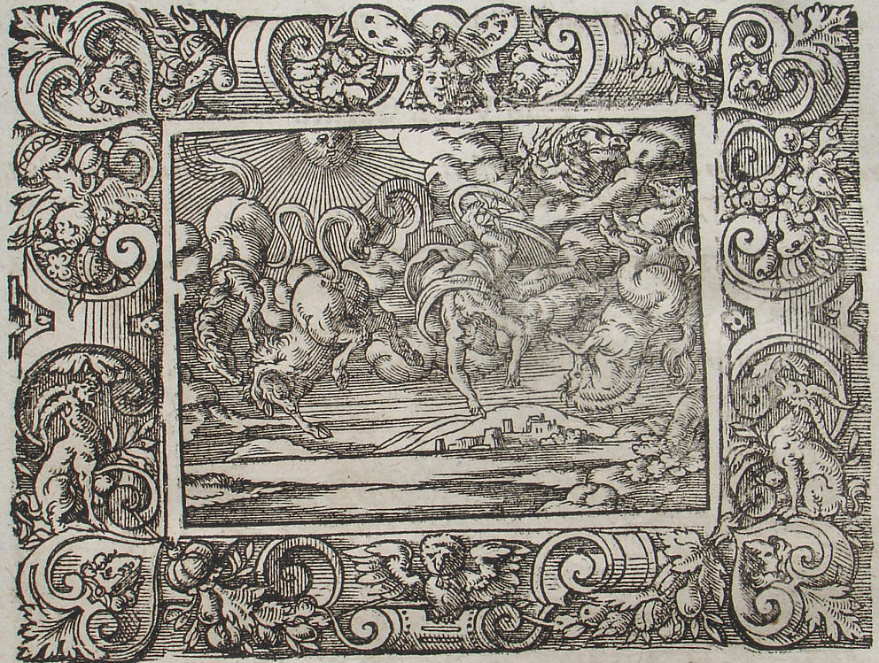 Holzschnitt Sturz des Phaeton